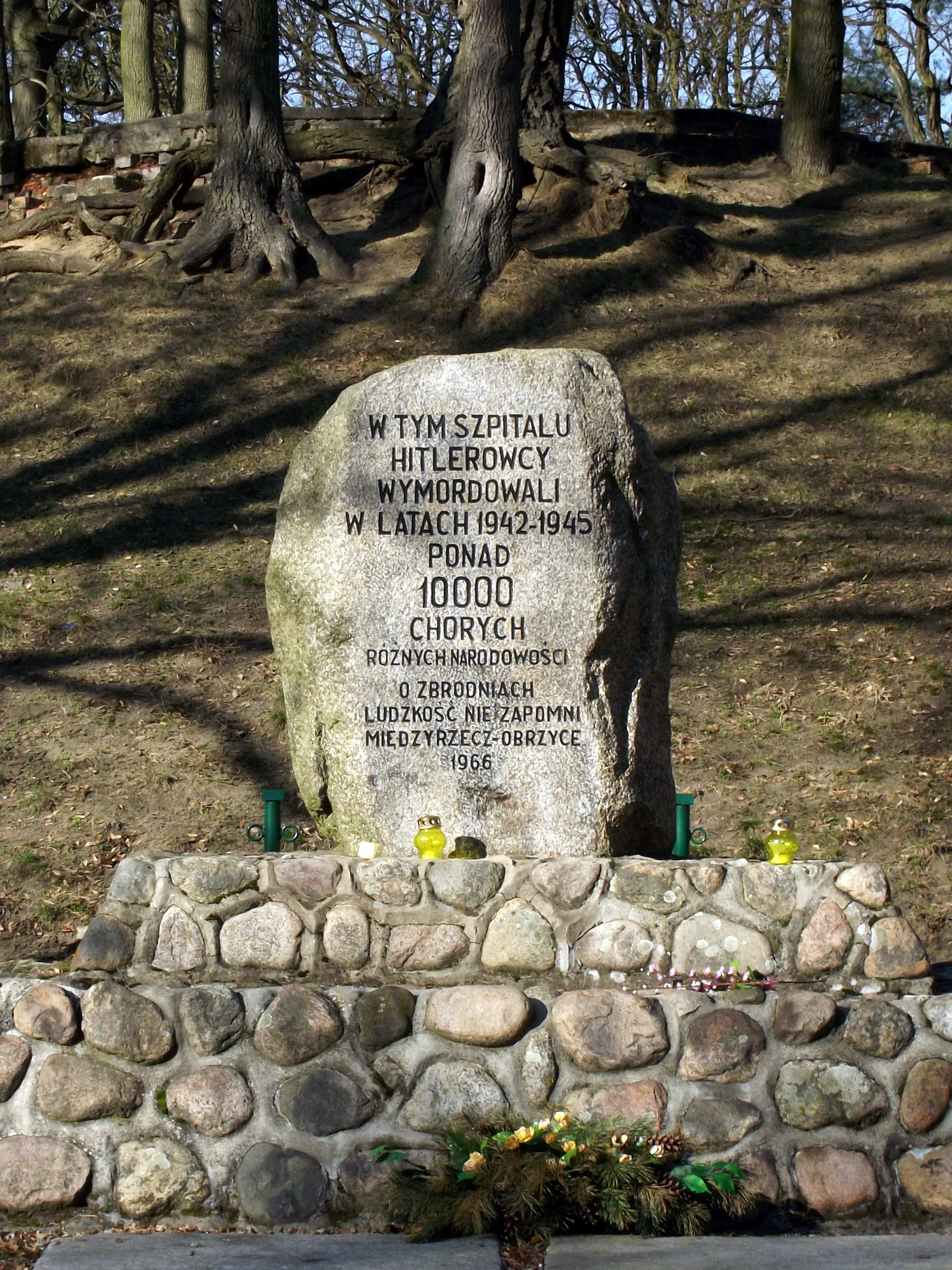 Pomnik ofiar w Międzyrzeczu-Obrzycach na terenie szpitala